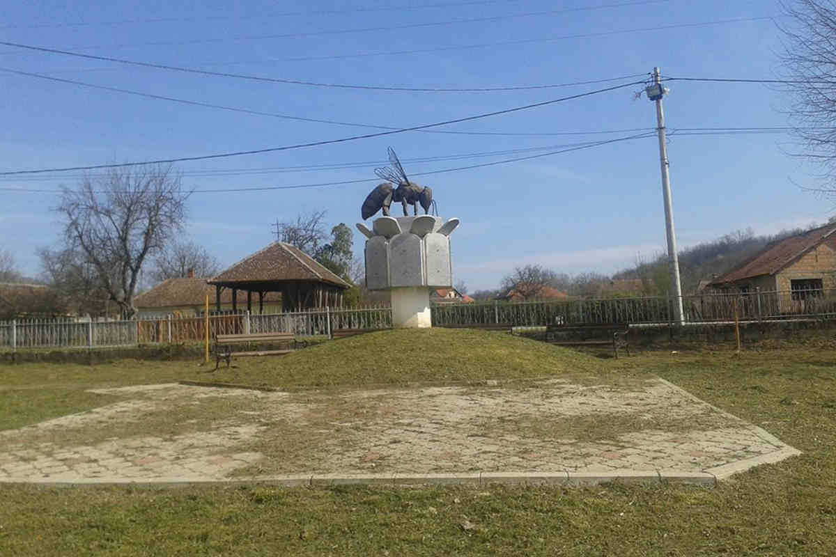 bee statue made of bronze in village Kamenovo, Serbia.